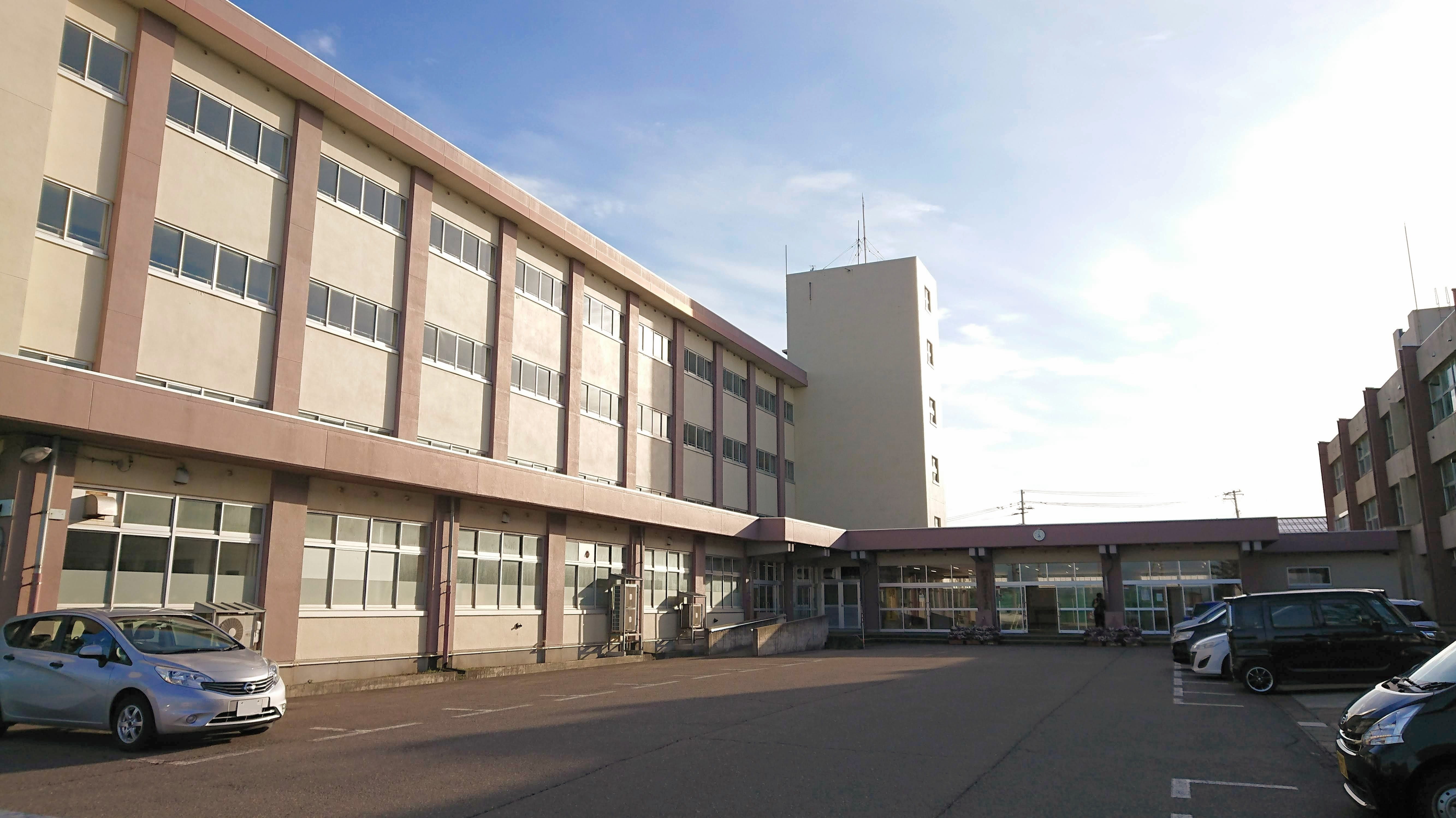 新潟県立直江津中等教育学校の校舎外観